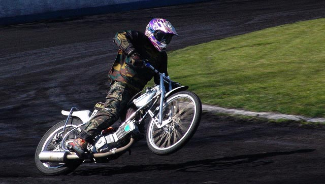 Autorem zdjęcia jest Przemysław Niepokój-Hepnar